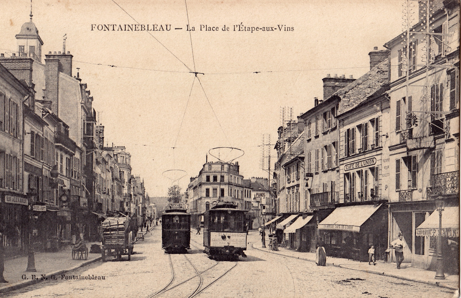 Carte postale ancienne éditée par G.B.N.G. à Fontainebleau :FONTAINEBLEAU - La Place de l'Etape